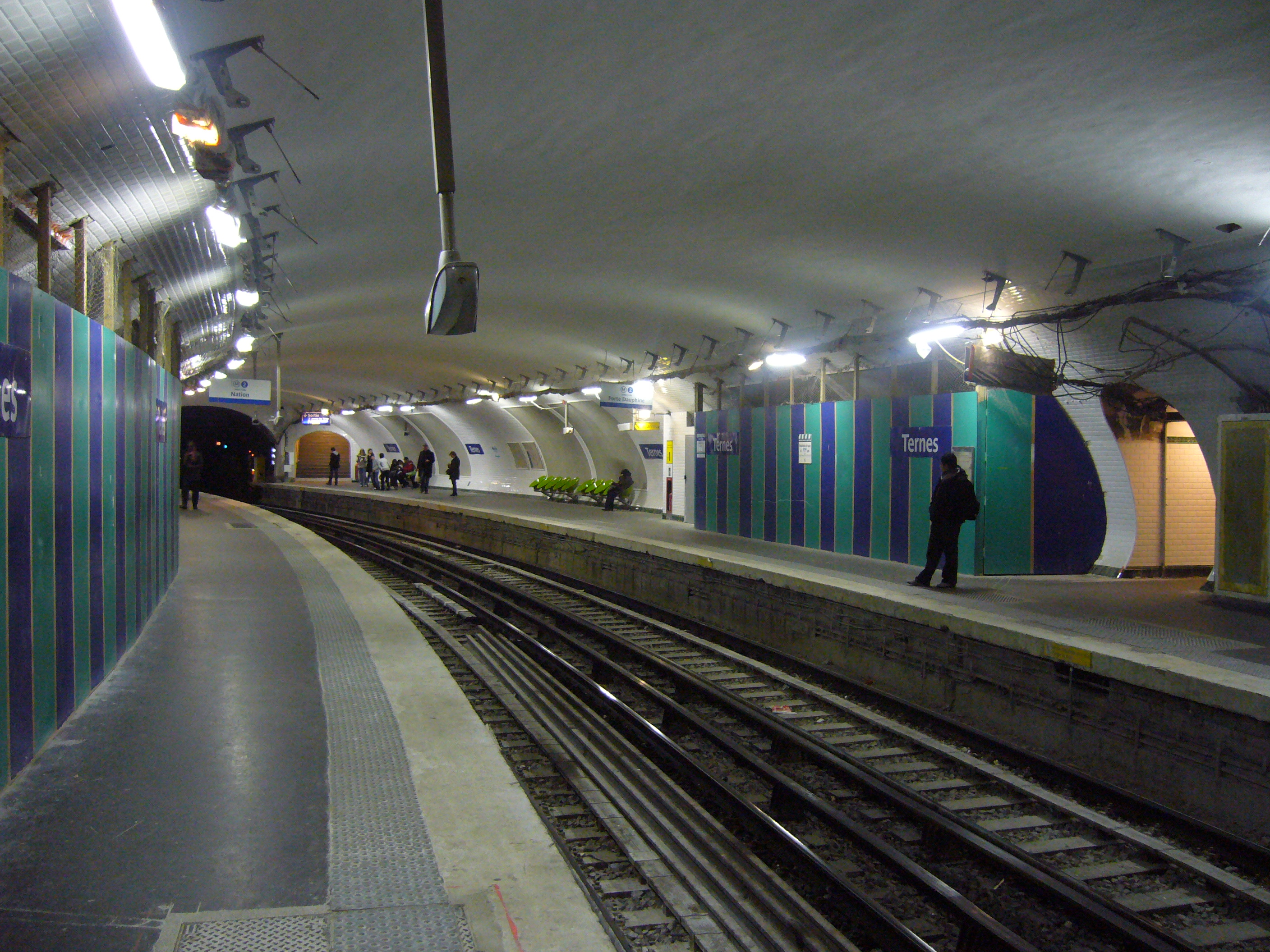 Quais en travaux de la station Ternes de la ligne 2 du métro de Paris.